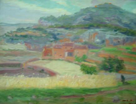 Paisatge